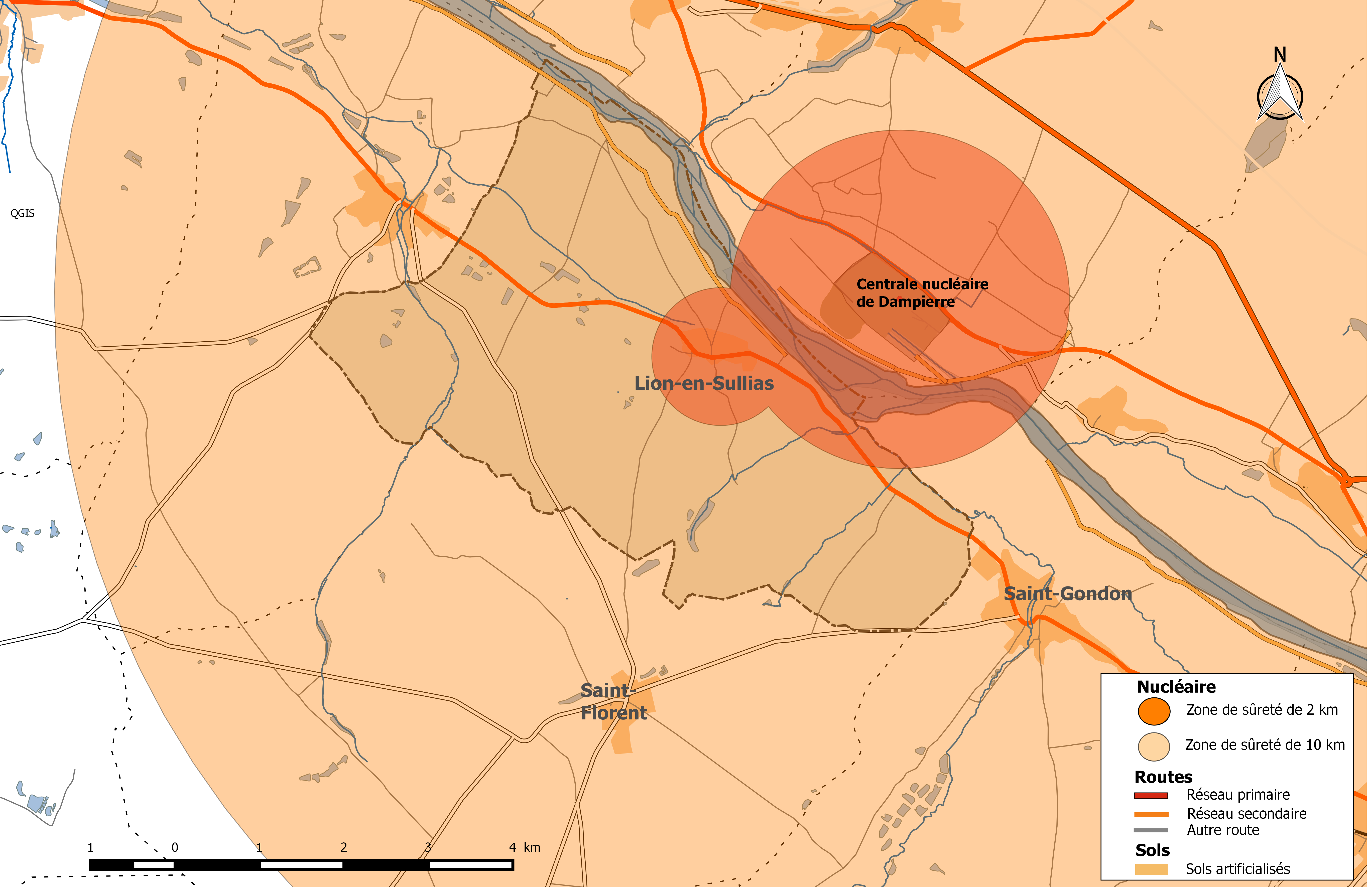 Zones de sûreté nucléaires 2 km et 10 km autour de la centrale de Dampierre - commune de Lion-en-Sullias